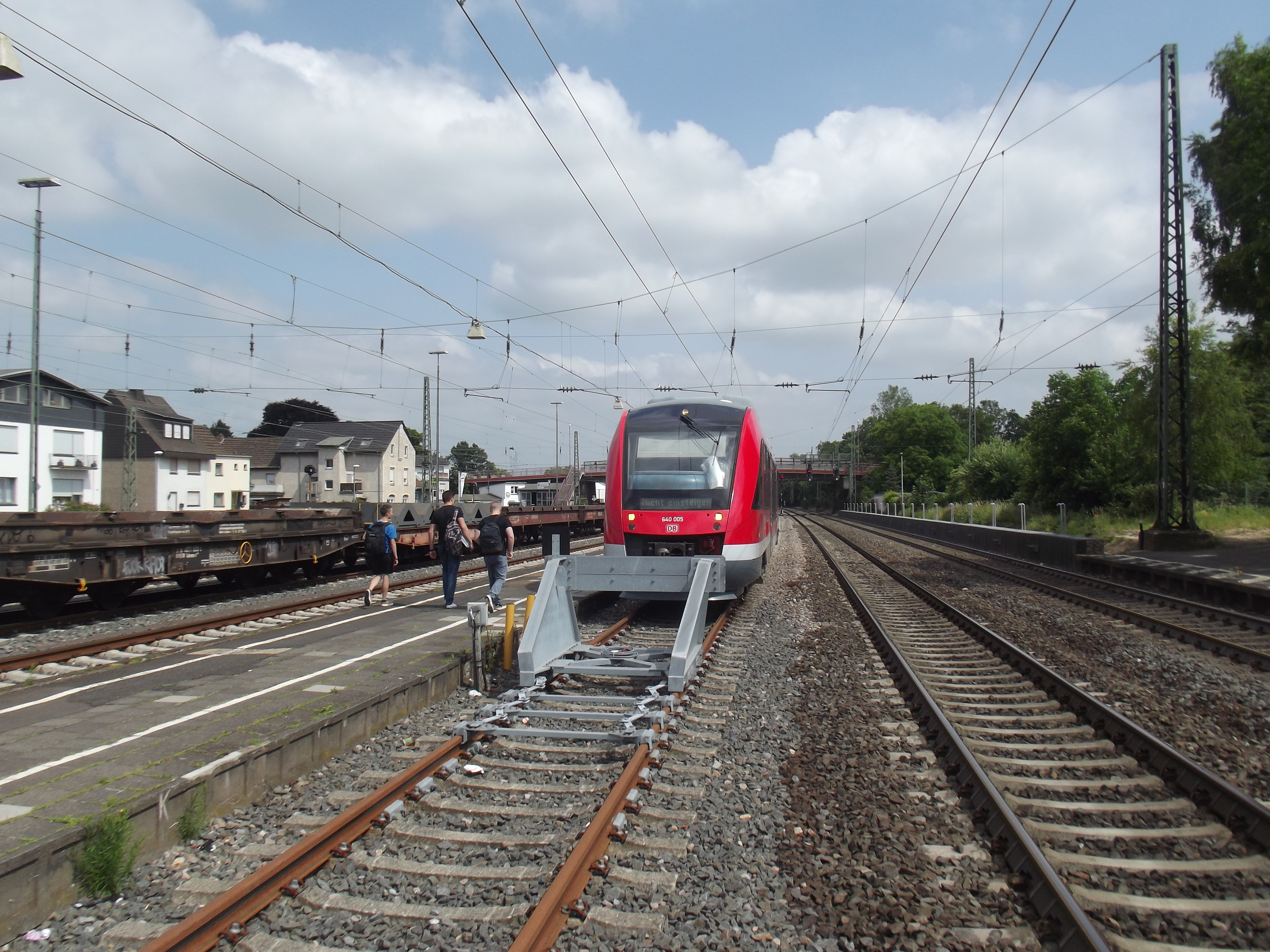 Het station van Andernach